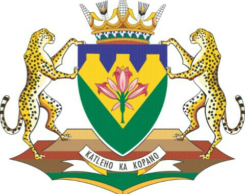 IsiZulu: Ibheji leFuleyisitata